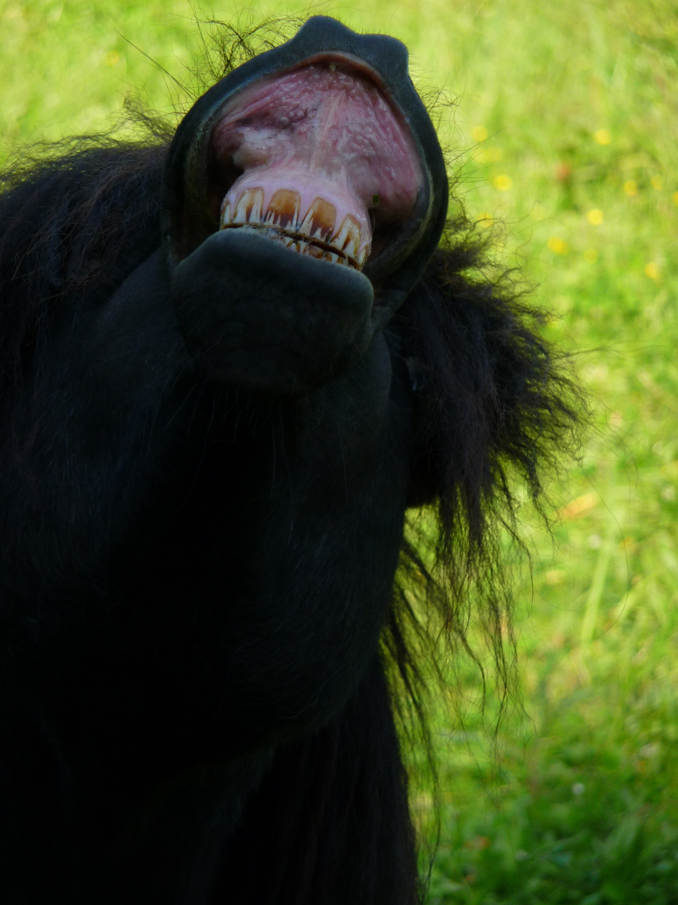 Flehmendes Shetland-Pony (Hengst)